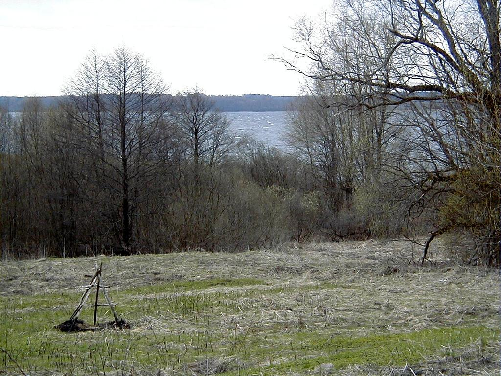 Lādes ezers pie Lādes muižas 2003-05-01